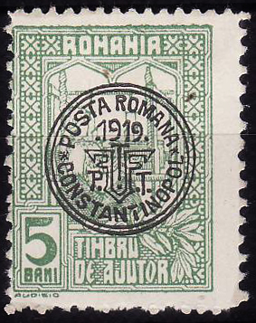 Почтовая марка румынской почты в Константинополе